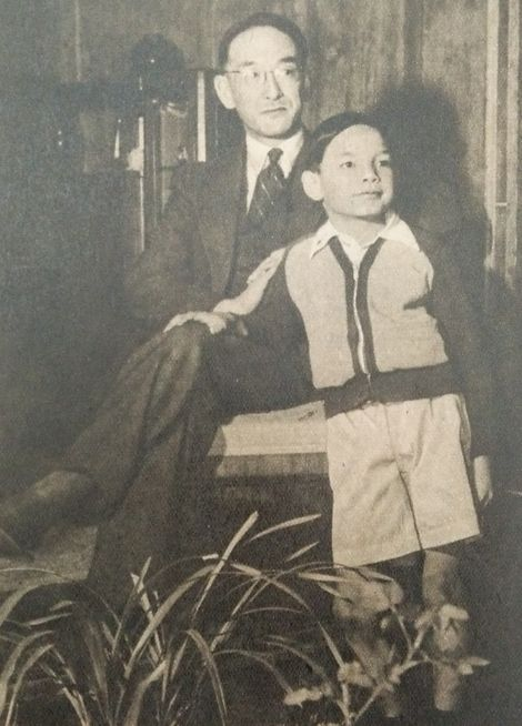 渡辺慧とその息子